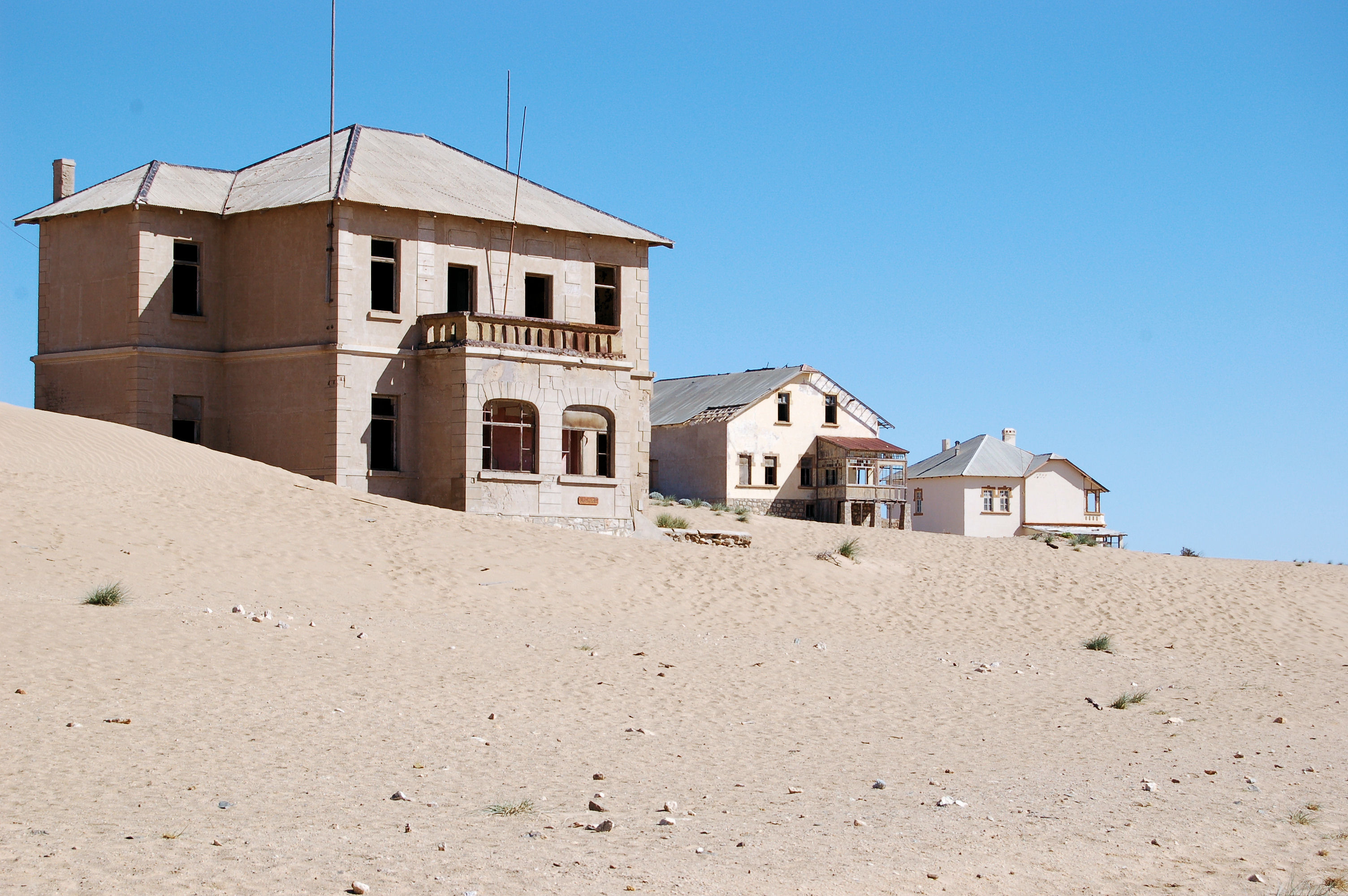 Kolmanskop, Namibia